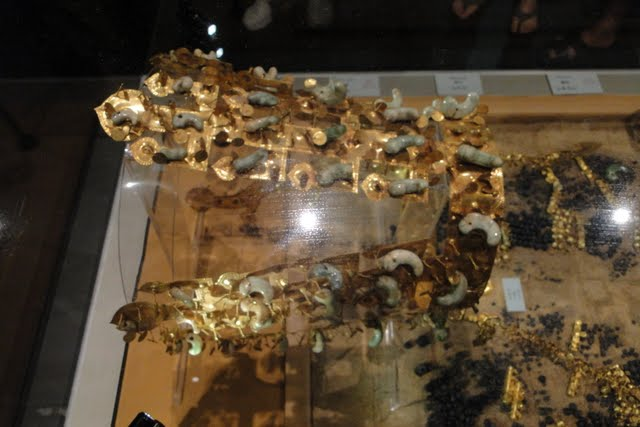 Царская Корона, национальное достояние 188 в Кёнджу